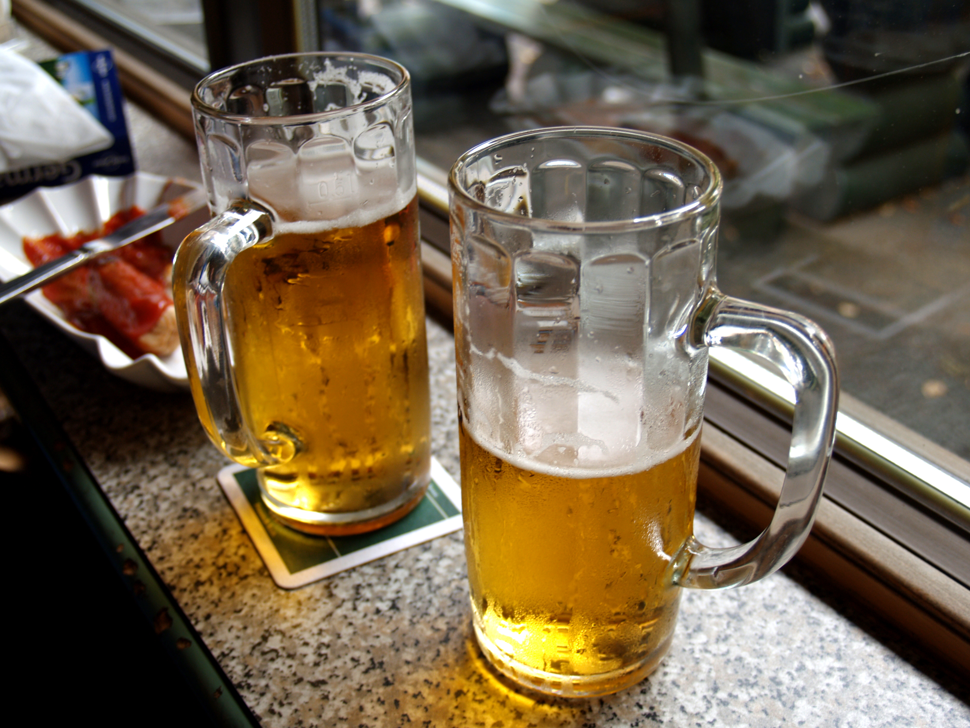 Ever wondered what beer looks like in Berlin?